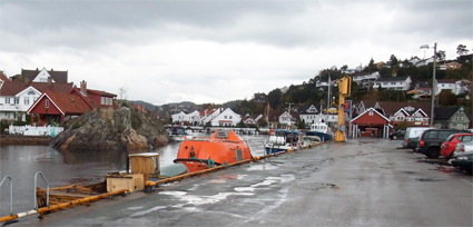 Parti fra havna i Høllen